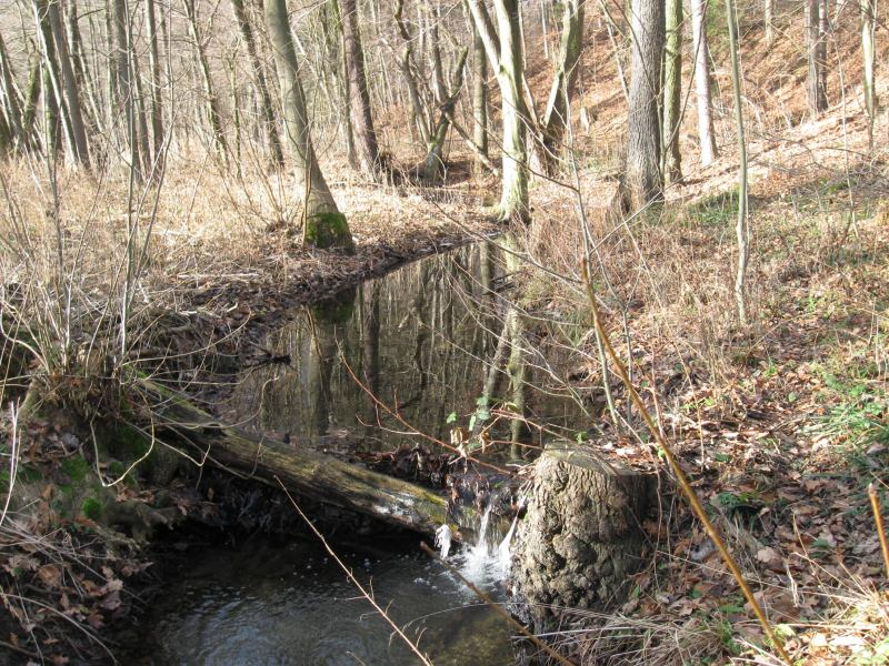 Rakovecké údolí - potok Rakovec